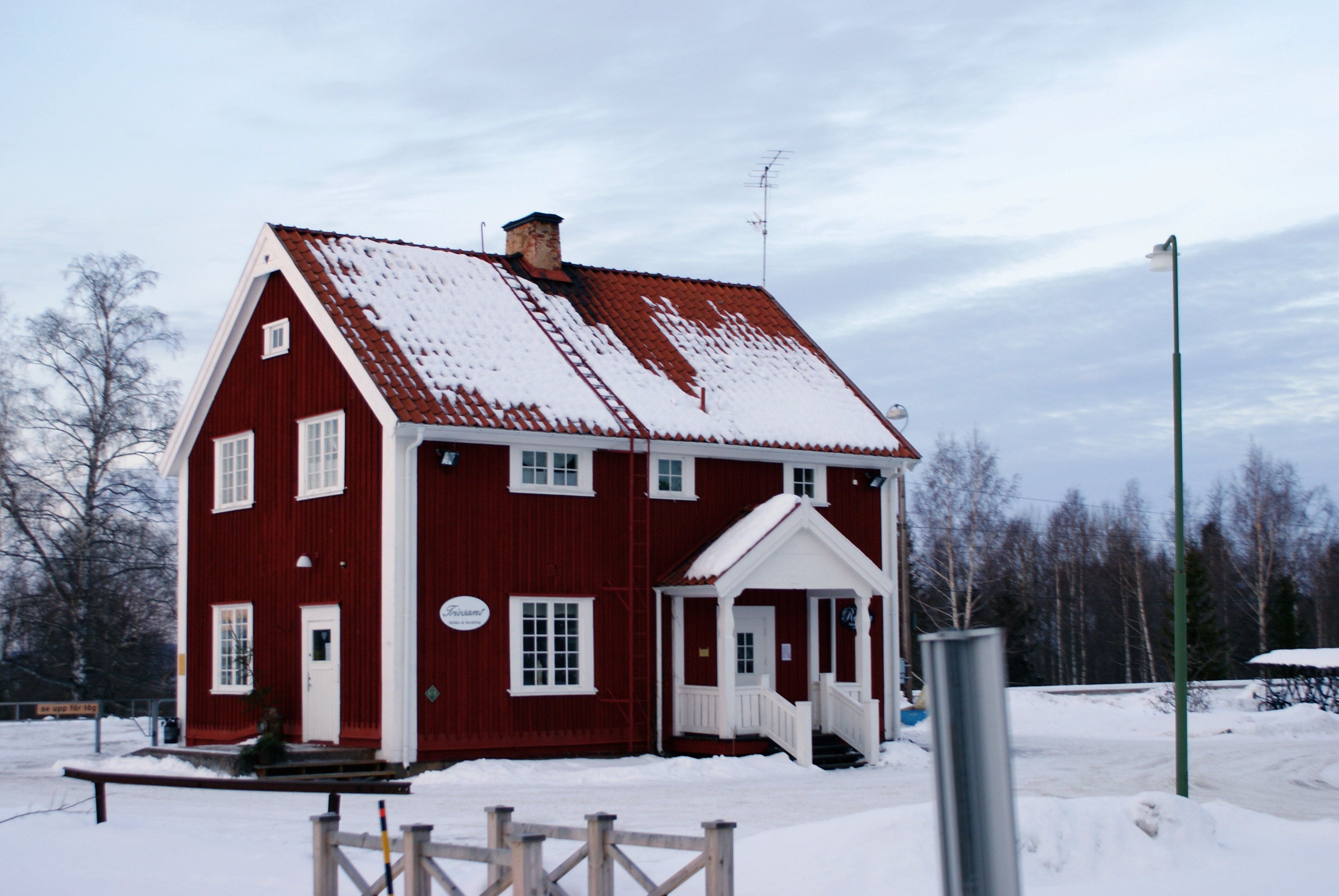 Tällbergs järnvägsstation i januari 2011.